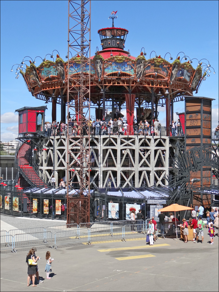 Le Carrousel des Mondes Marins dans le parc des chantiers Créé par la Compagnie La Machine dont les ateliers sont installés dans les Nefs des anciens chantiers navals, le Carrousel des Mondes Marins est, avec le Grand Éléphant, l'autre grande attraction festive du "Voyage à Nantes". "le Voyage à Nantes" (15 juin-19 août 2012), est une opération promotionnelle du territoire par l'art contemporain dirigée par Jean Blaise et qui succède à la biennale Estuaire dont 2012 est la dernière édition. Site du Voyage à Nantes Ce carrousel géant, de près de 25 mètres de haut et de 22 mètres de diamètre, est implanté en bord de Loire. Véritable théâtre à 360°, il accueille le public dans une incroyable sculpture dédiée à la mer. Les visiteurs sont spectateurs d’étranges et inquiétantes créatures marines qui tournent dans un gigantesque aquarium mécanique monté sur trois niveaux. Ils découvrent la mer dans tous ses états, depuis les fonds marins, les abysses et jusqu’à la surface des océans. Extrait du Site des Machines de l'île de Nantes Cette réalisation imposante, ouverte le 15 juillet dernier, est bien plus qu'un manège pour les enfants, c'est un véritable spectacle pour tous les âges. La créativité des concepteurs s'est exprimée avec brio dans les formes fantastiques des animaux marins articulés et répartis sur les 3 étages. On peut monter sur chacun d'eux, avec la possibilité d'actionner des parties mobiles. Les visiteurs participent ainsi à la fête. A signaler, l'autonomie énergétique de ce manège qui fonctionne à l'énergie solaire.